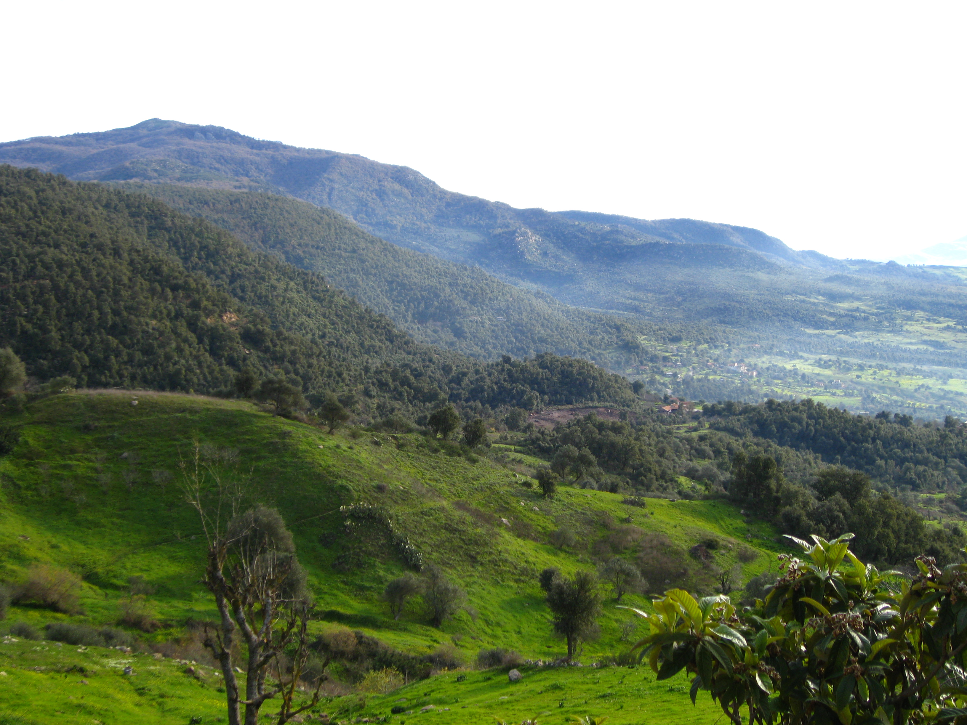 Village de Boudjellil dans la commune d'Aghribs en Kabylie (Tizi-Ouzou, Algérie).